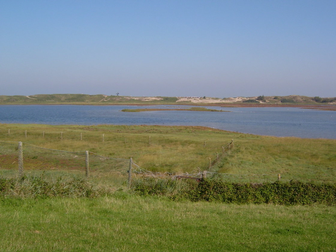 Réserve du ZWIN (Belgique)